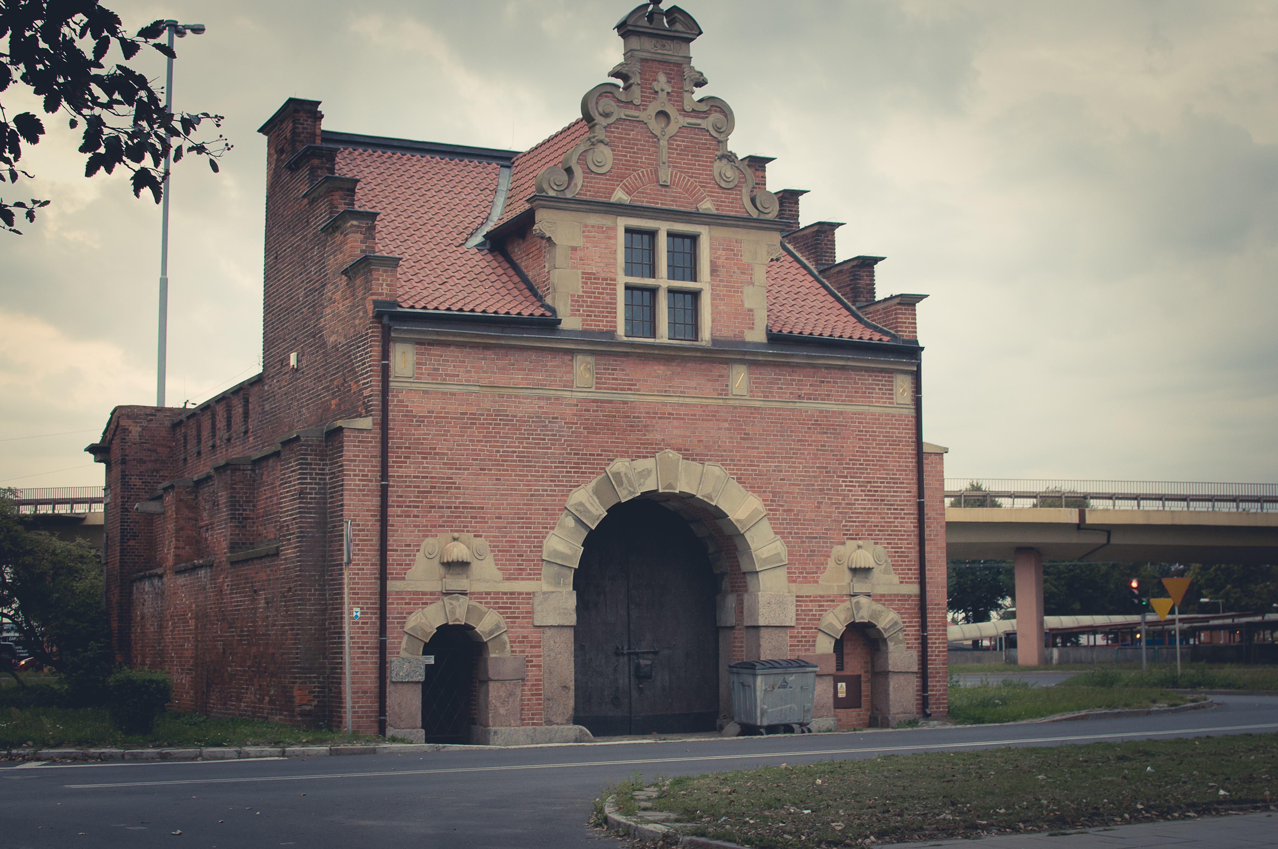 Gdańsk Długie Ogrody, ul. Długie Ogrody - Brama Żuławska (Brama Długich Ogrodów), XVII